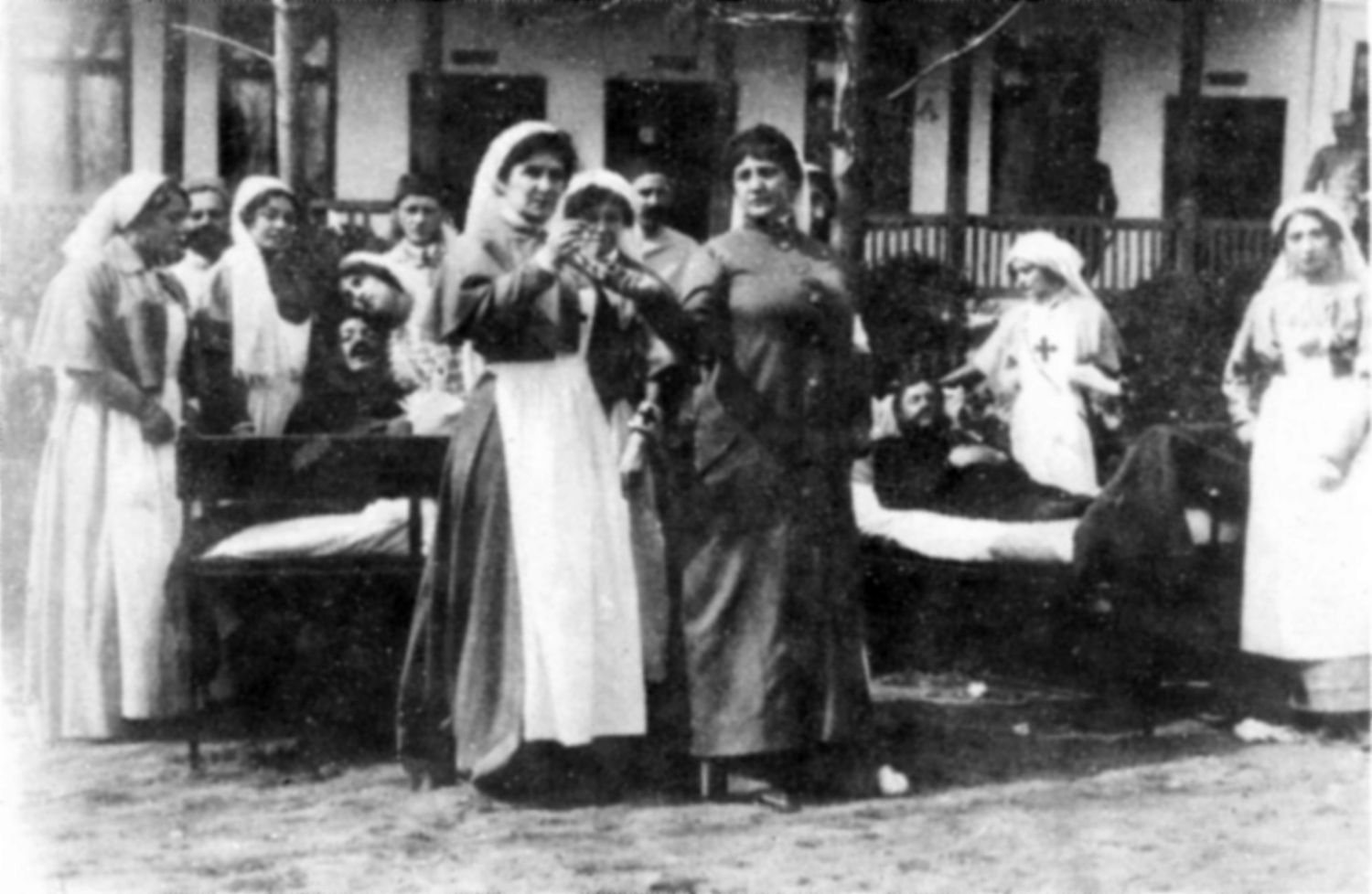 Frame from Independenţa României film (1912). Red Cross ladies. Among them: Aristizza Romanescu, Elvira Popescu.